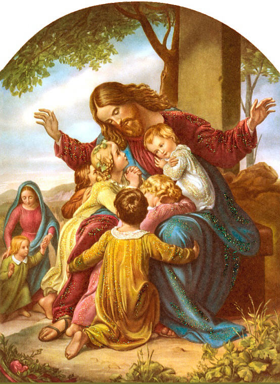 Lasset die Kinder zu mir kommen (Mk 10,14)